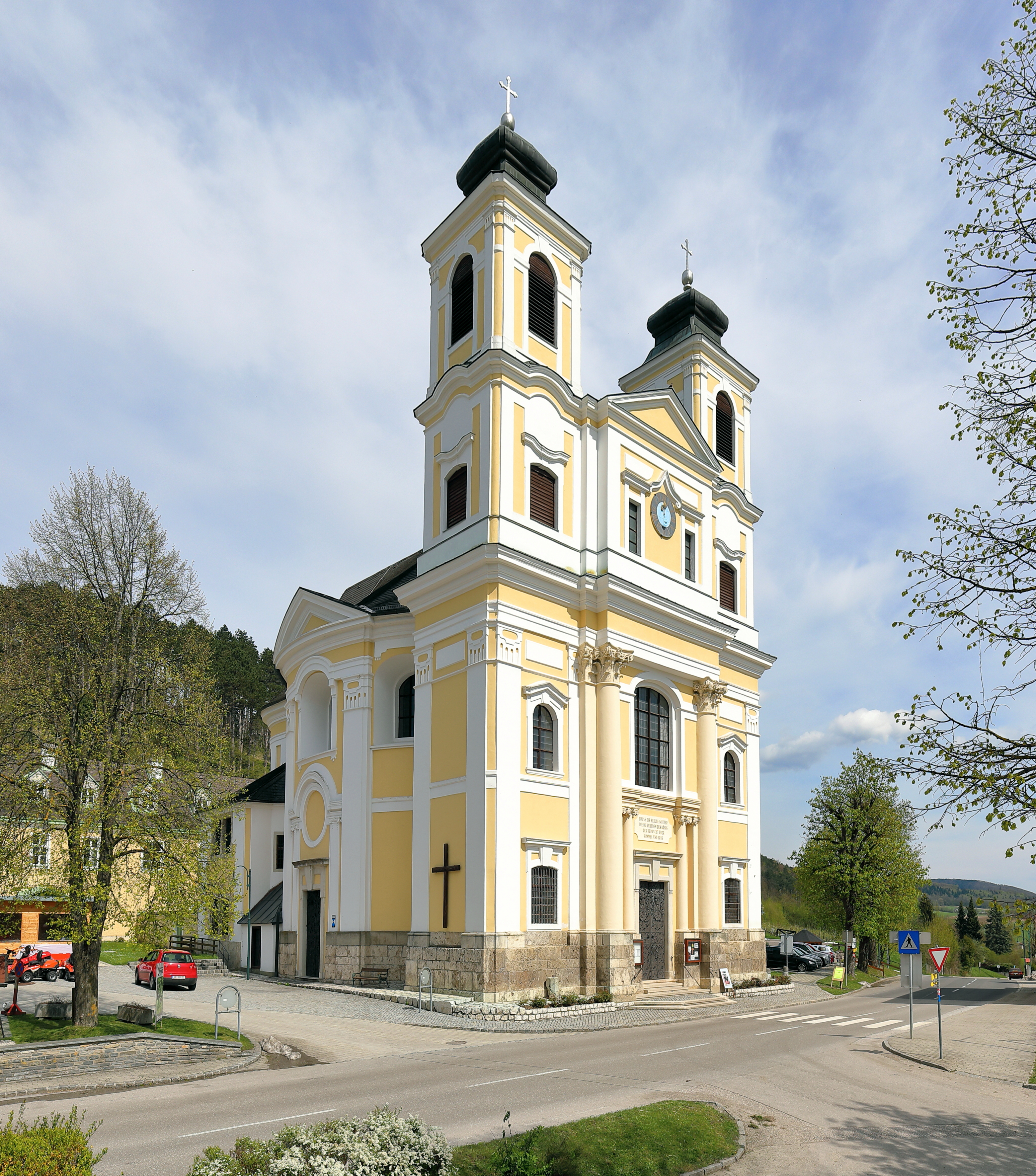 Die Pfarr- und Wallfahrtskirche Unsere liebe Frau am Hafnerberg in der niederösterreichischen Marktgemeinde Altenmarkt an der Triesting. Der barocke Zentralbau wurde an Stelle einer Kapelle nach Plänen von Daniel Dietrich von 1729 bis 1740 errichtet.